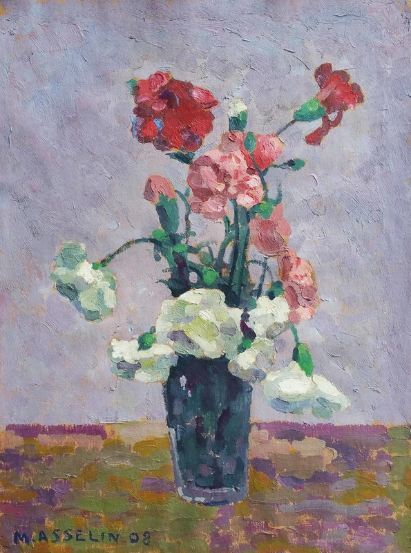 Bouquet d’œillets, huile sur panneau 37,5 x 27,5 cm (sans le cadre) signé et daté M. ASSELIN 08 en bas à gauche.